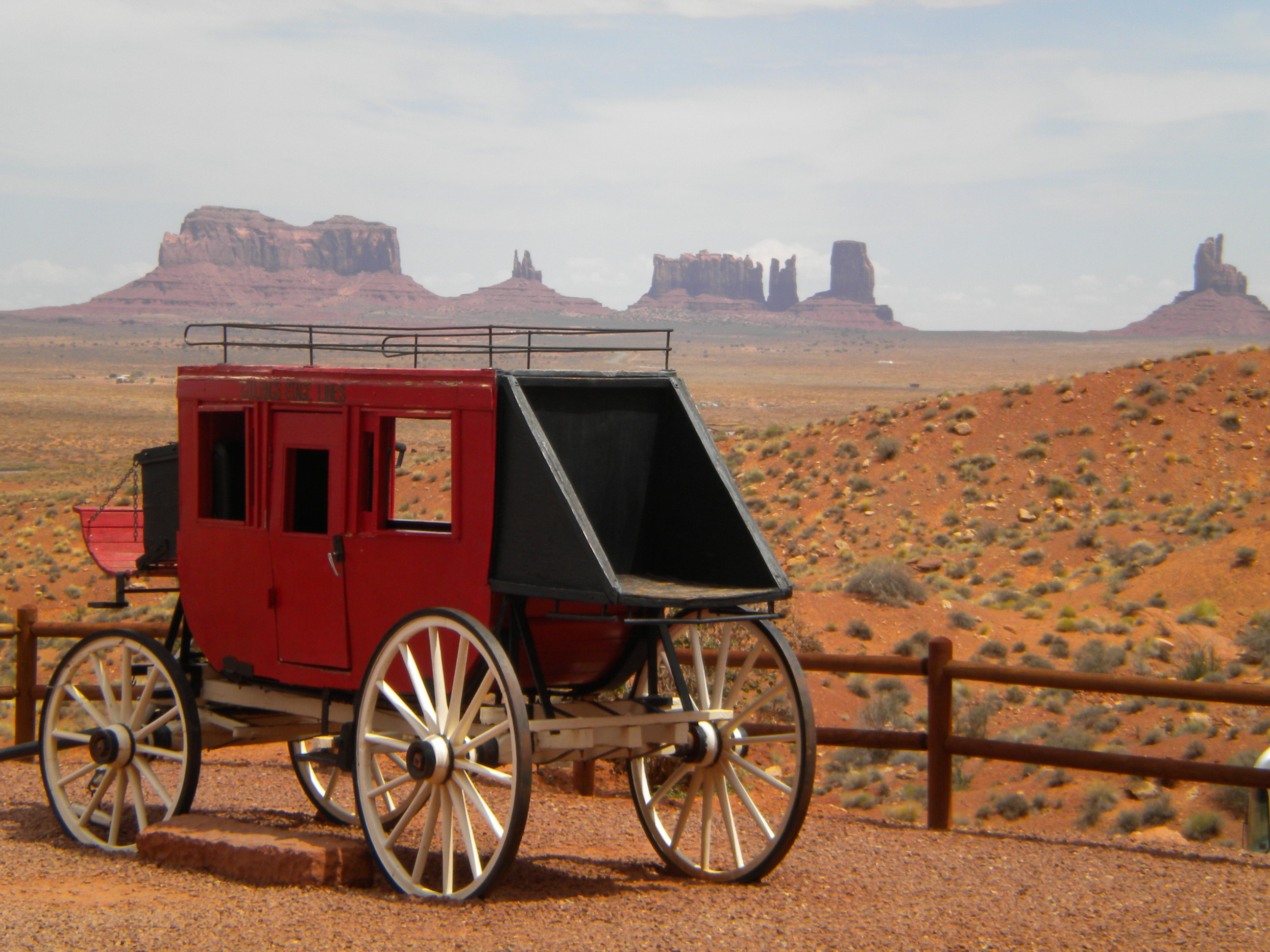 Fotografia de la meva estada als Estats Units